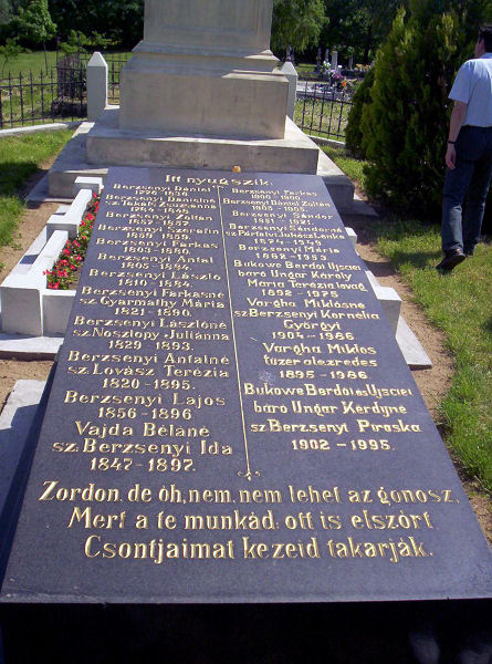 A Berzsenyi család sírja Niklán (Somogy megye, Magyarország)